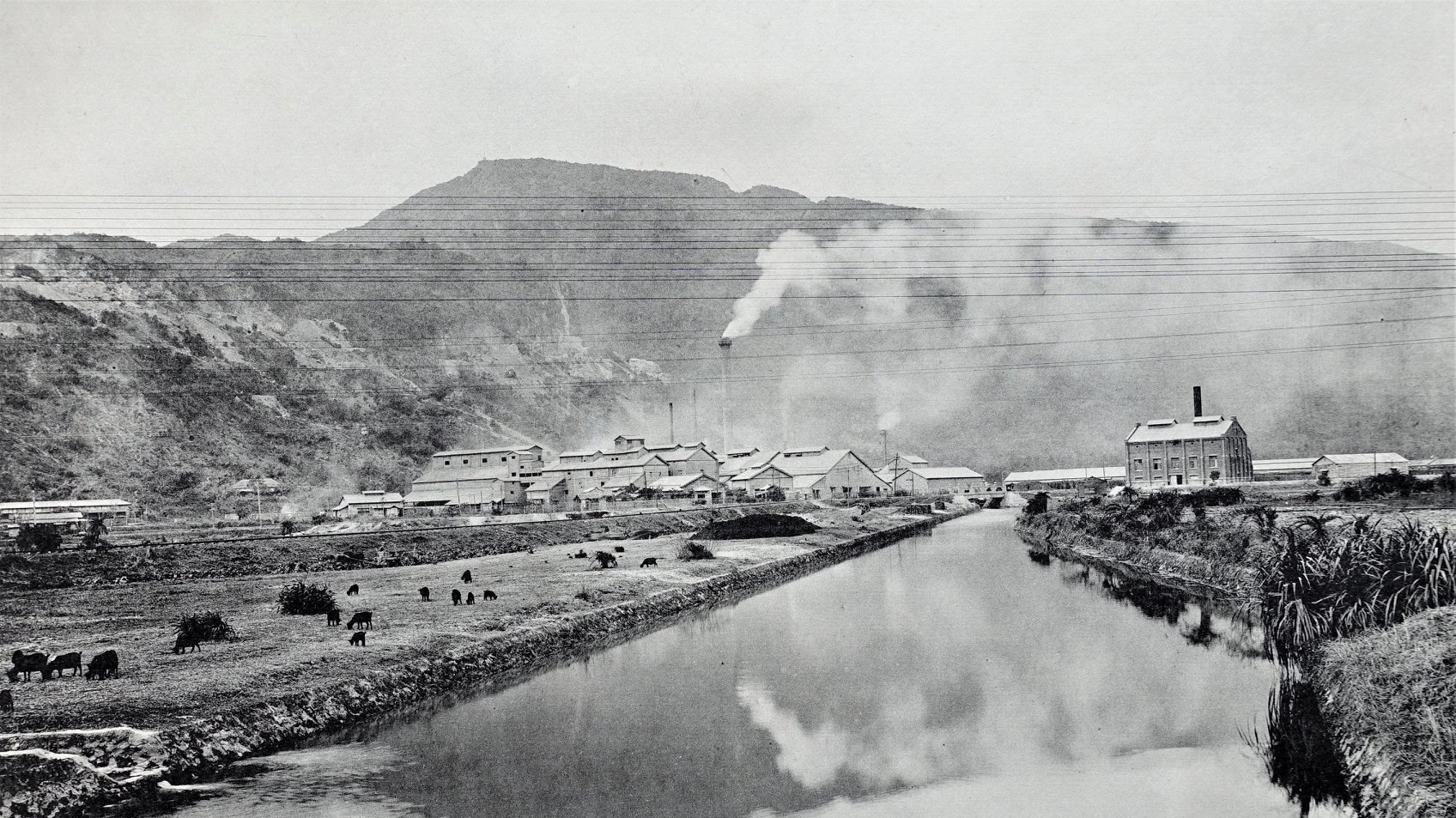 中文（台灣）: 淺野セメント（水泥）設於高雄的工場設施。